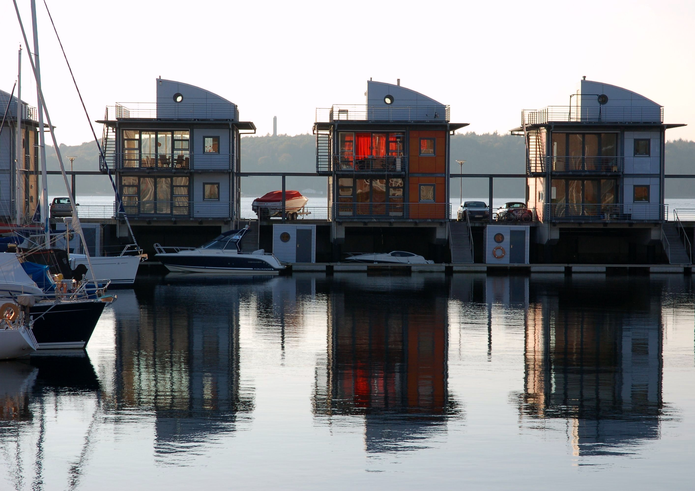 "Water Houses" in Sonwik, Flensburg, Germany